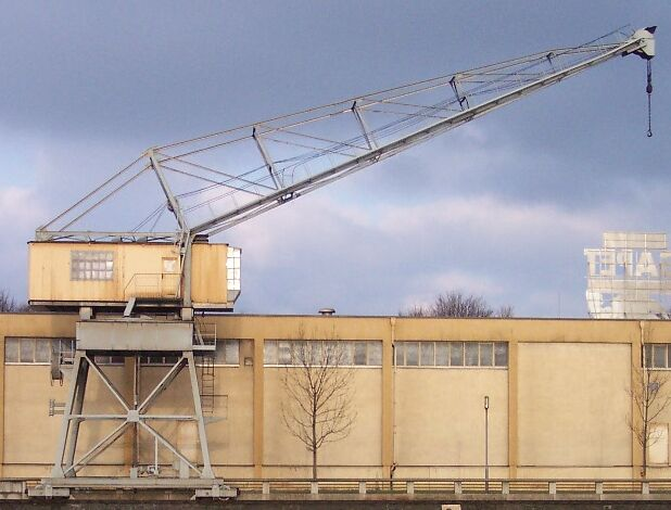 Turmdrehkran im Duisburger Hafen, eigenes Bild, GNU-FDL Abgebildeter Kran ist kein Turmdrehkran, sondern ein Portaldrehkran mit festem Ausleger.